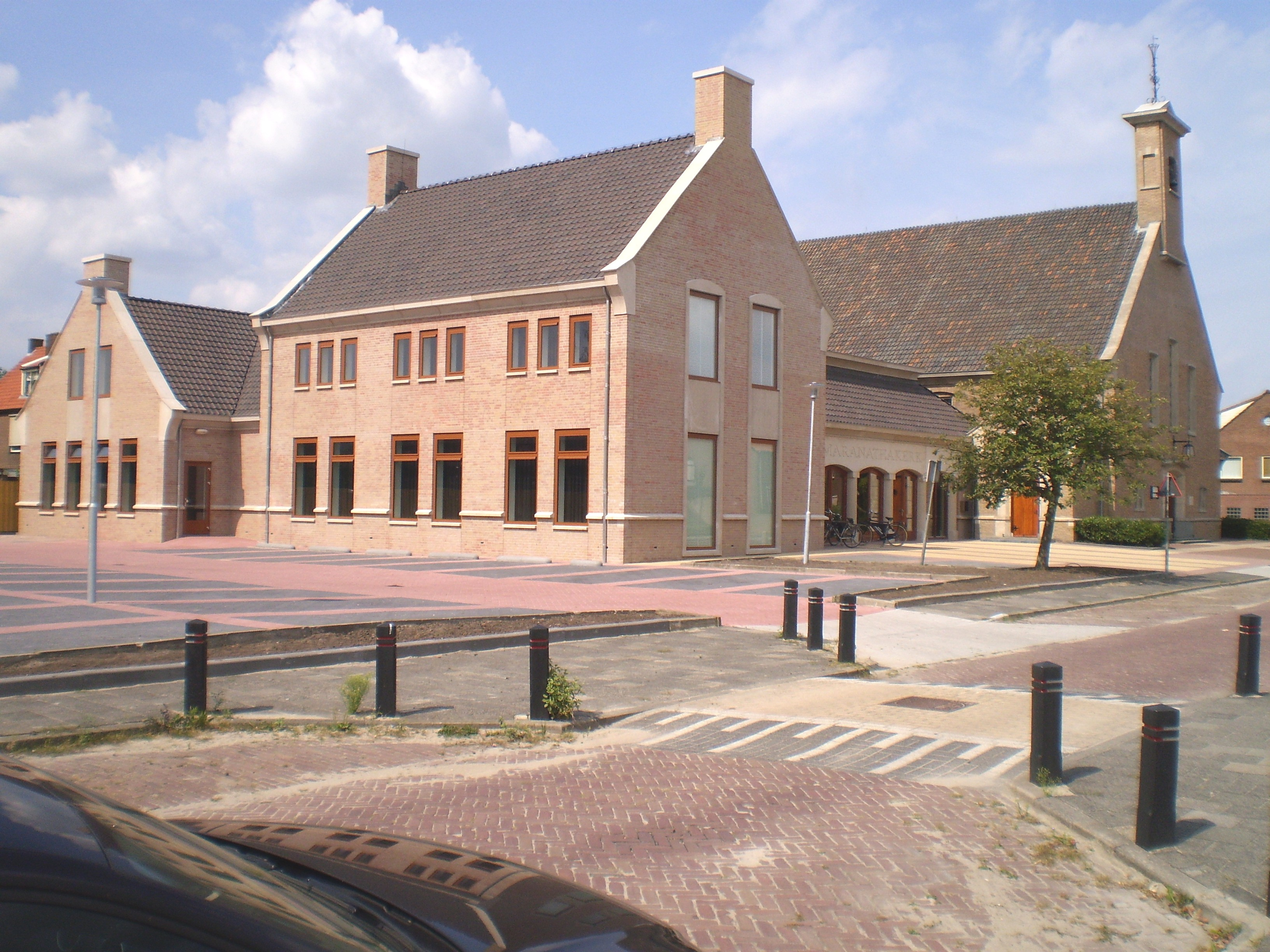 Ofbyld oanbean troch Swarte Kees op 20 augustus 2009